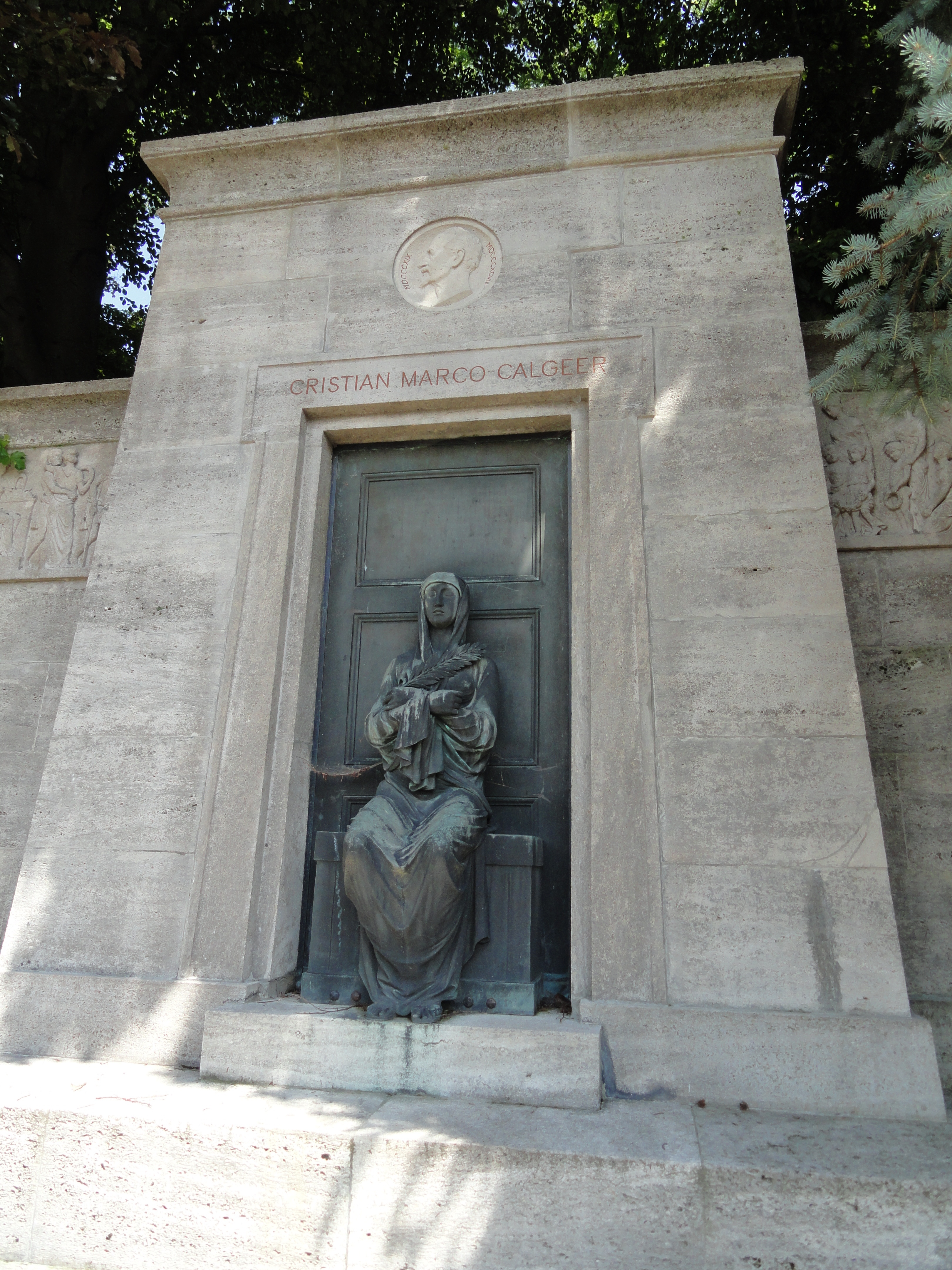 Evangelischer Friedhof Kempten - Friedhofskapelle, Ausgrabungen dahinter sowie Grabstellen einiger "Promis"